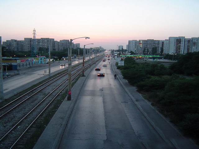 ж.к. Люлин - излгед от тунела